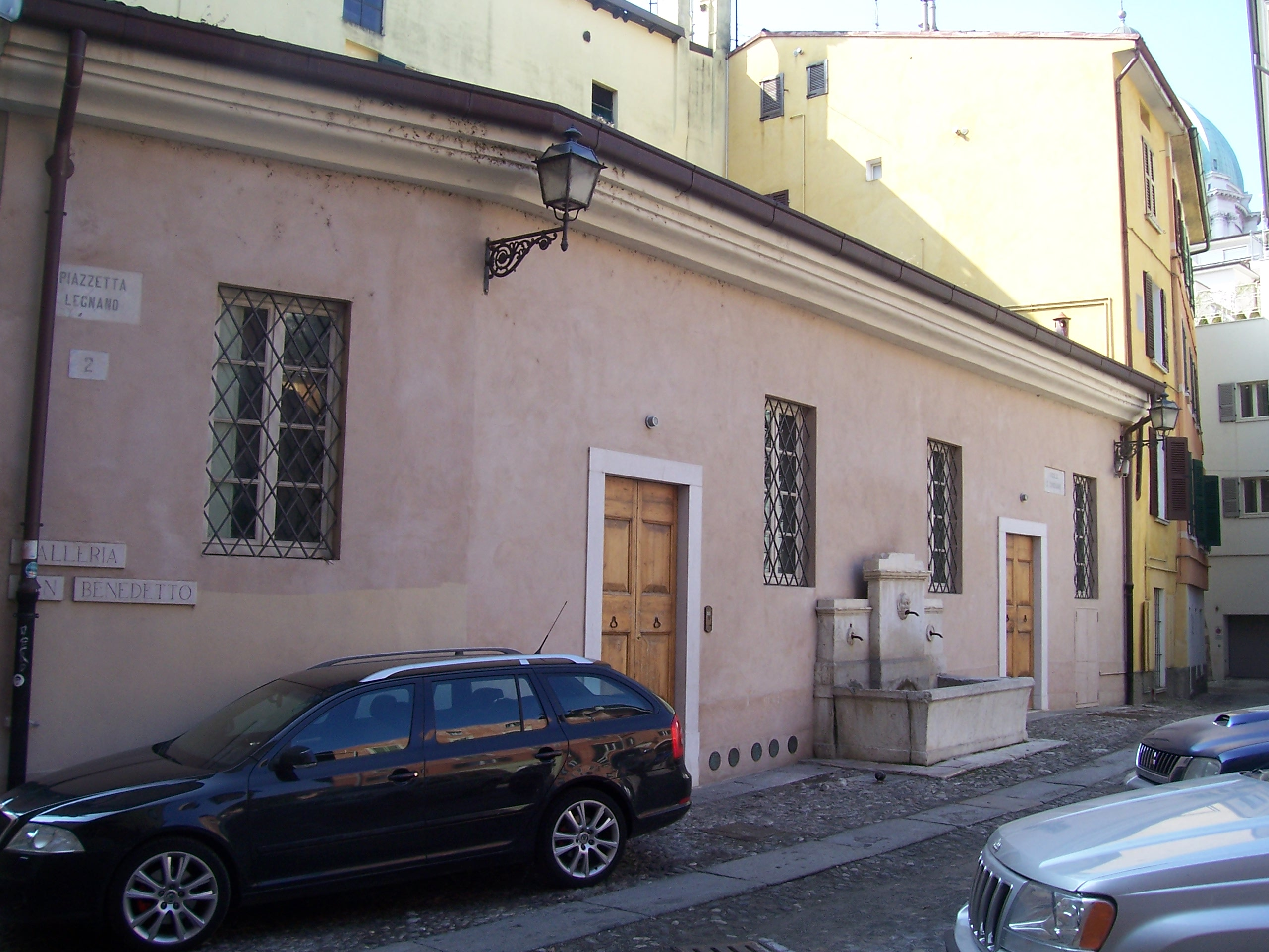 san benedetto (brescia) fianco